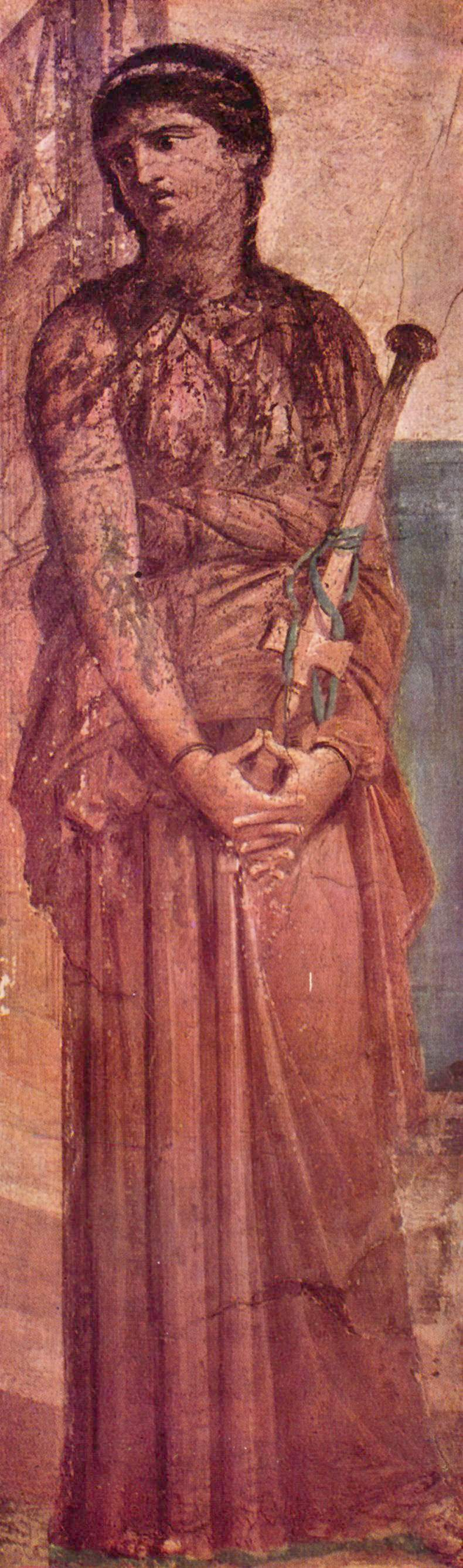 Medea. Affresco da Ercolano, oggi al Museo Archeologico Nazionale (Naples) (inv. nr. 8976), copia romana, del 70/79 d.C. circa, da un originale greco di Timomaco (ca. 50 a.C.). Medea medita l'uccisione dei figli.